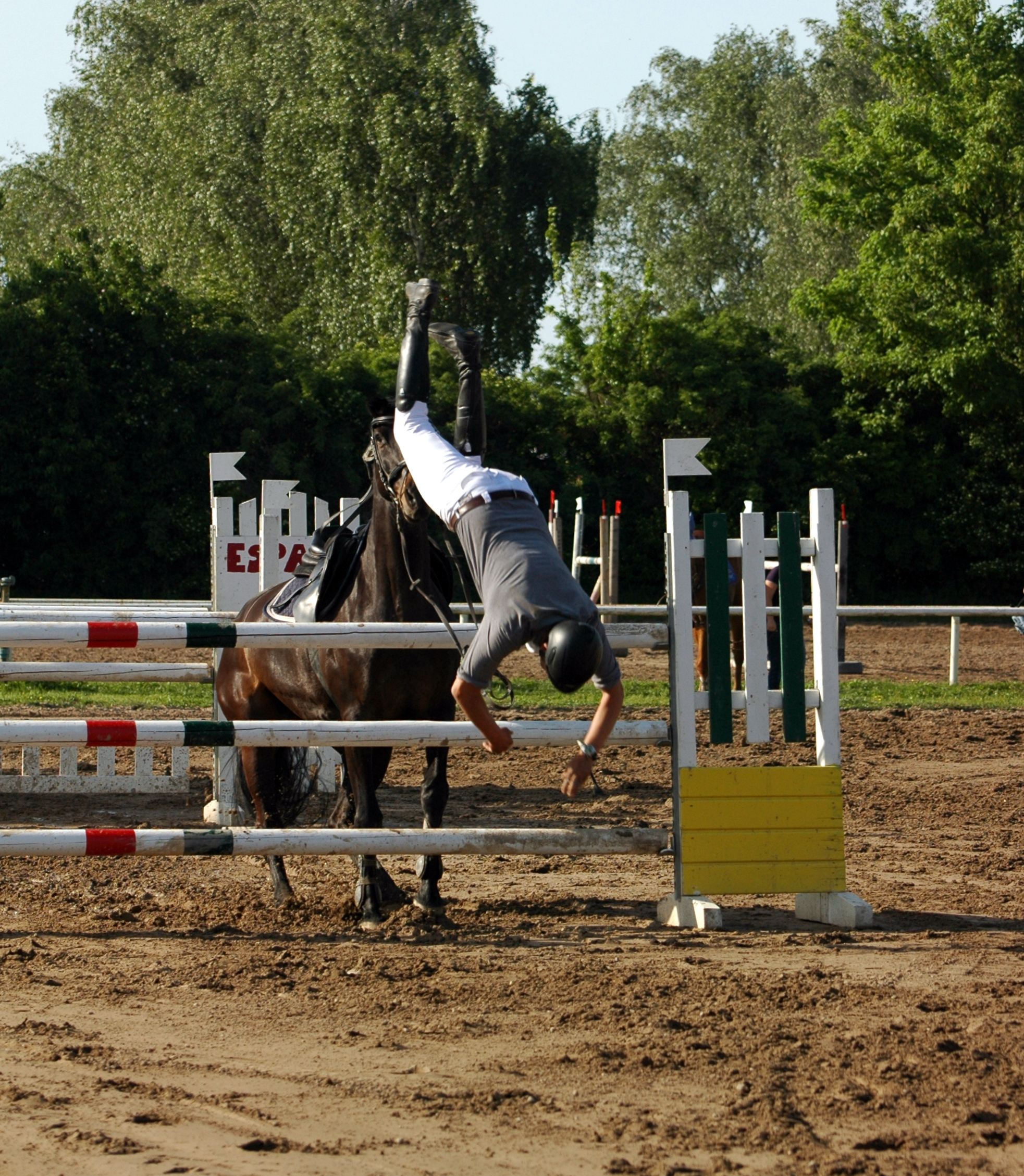 Heidelberg-Wieblingen - Reitturnier - 2018-05-05